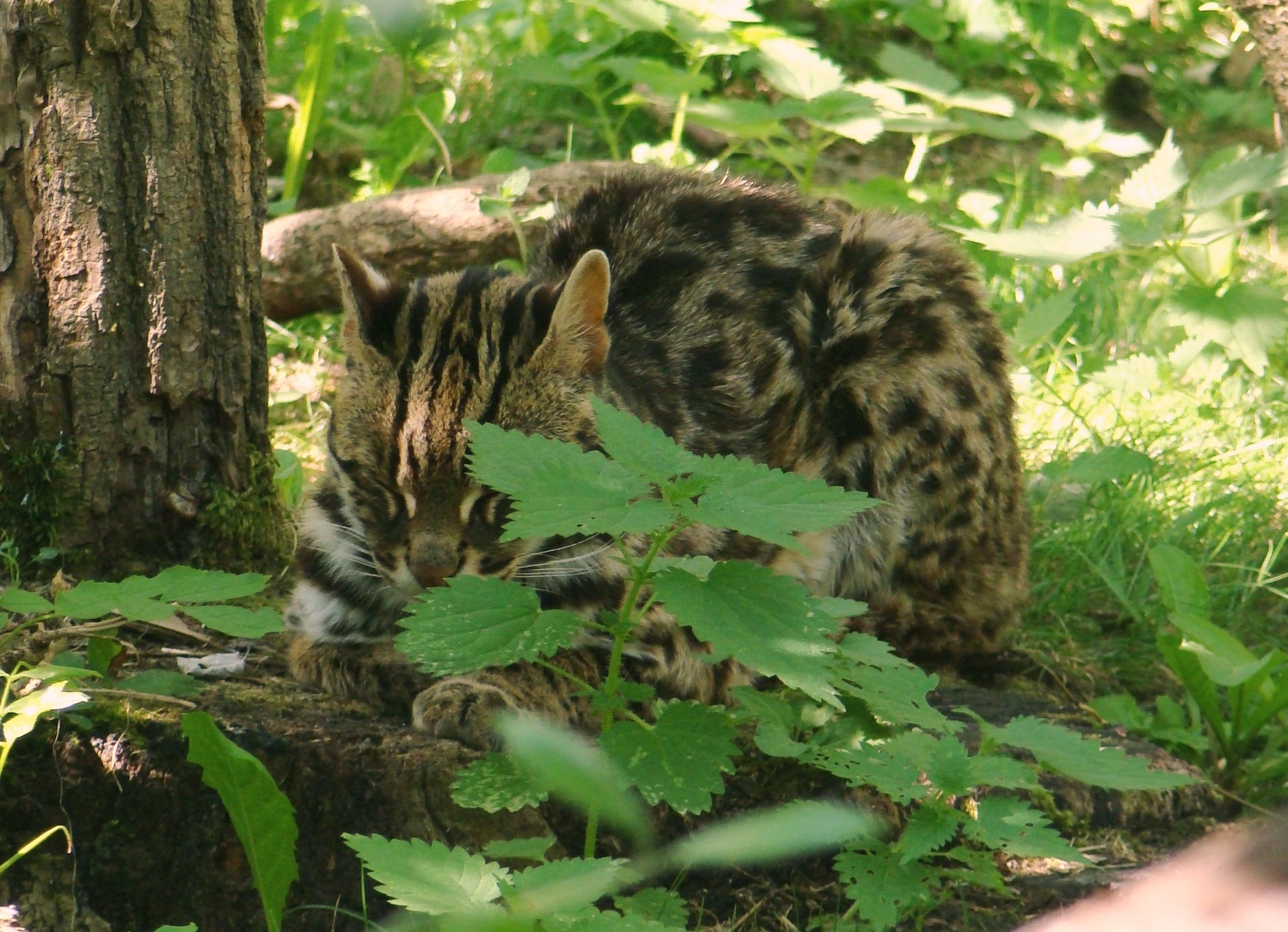 Chat-léopard du Bengale (Prionailurus bengalensis bengalensis) au parc des félins.